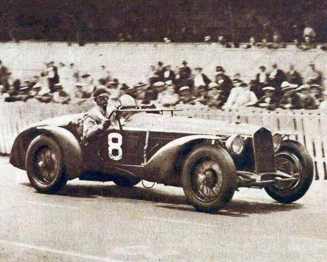 L'Alfa Romeo 8C 2300LM de Sommer et Chinetti, victorieuse des 24 heures du Mans en 1932.